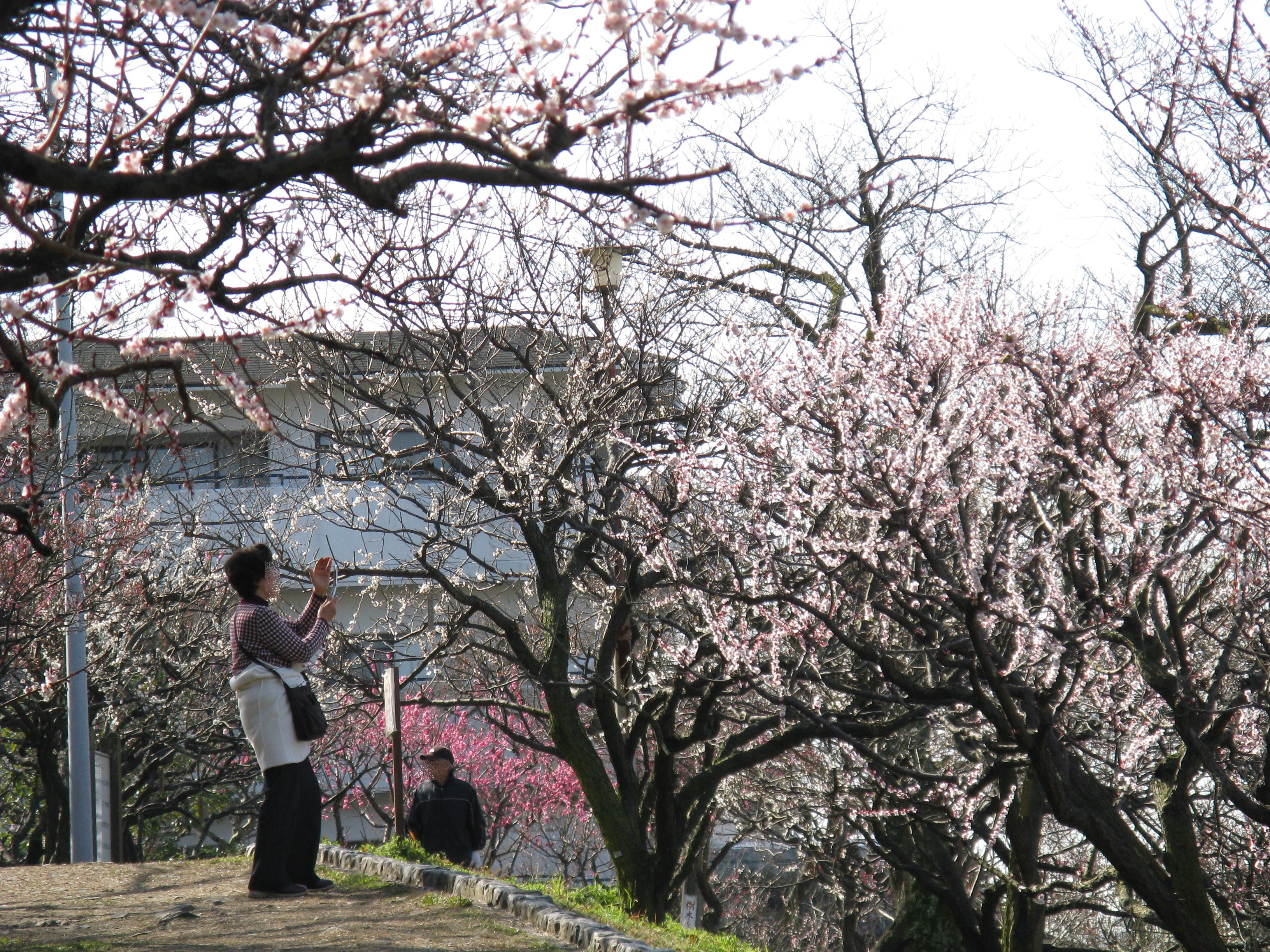 枚岡公園